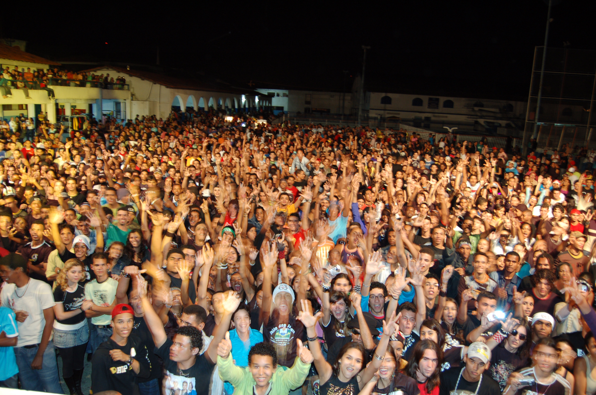 Público num show da banda Oficina G3 na cidade de Feira de Santana, Bahia, em meados de 2006.